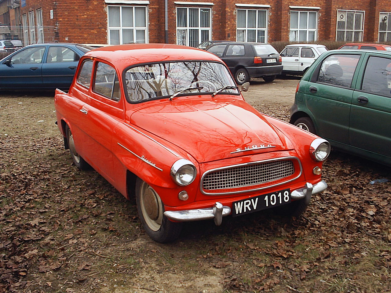 Skoda Octavia.